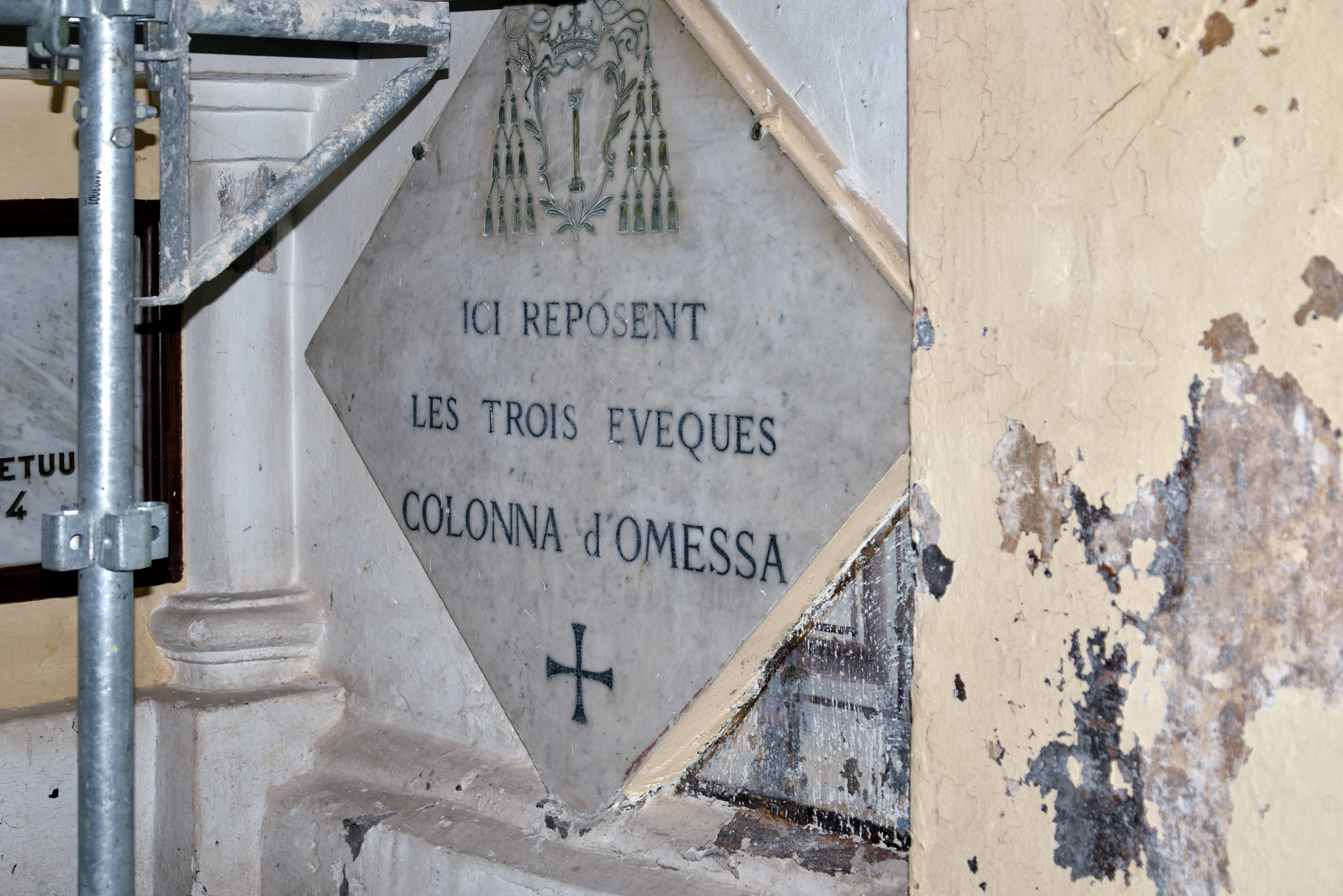 Omessa, Talcini (Corse) - Plaque mortuaire des 3 évêques Colonna dans l'église Saint-André en cours de réfection